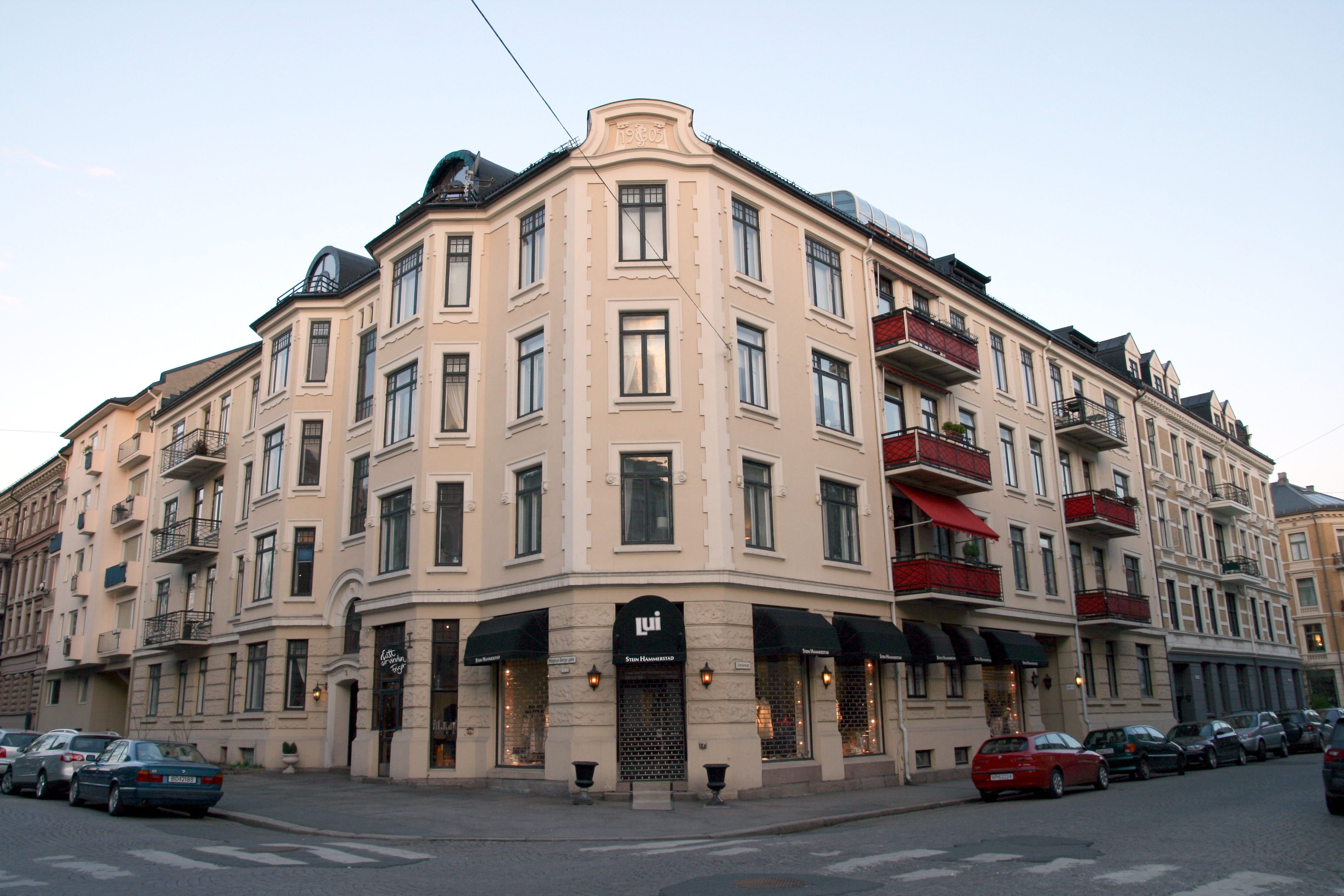 Magnus Bergs gate 3, Frogner i Oslo.